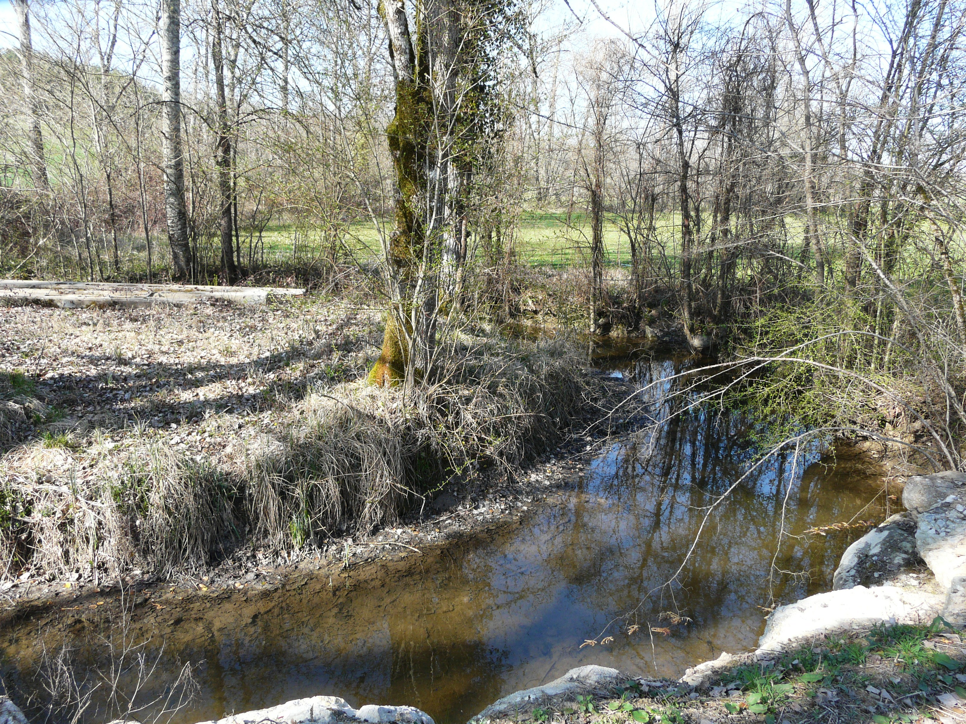 Le Boulou au Meyrat, Saint-Crépin-de-Richemont, Dordogne, France. Vue prise en direction de l'amont.